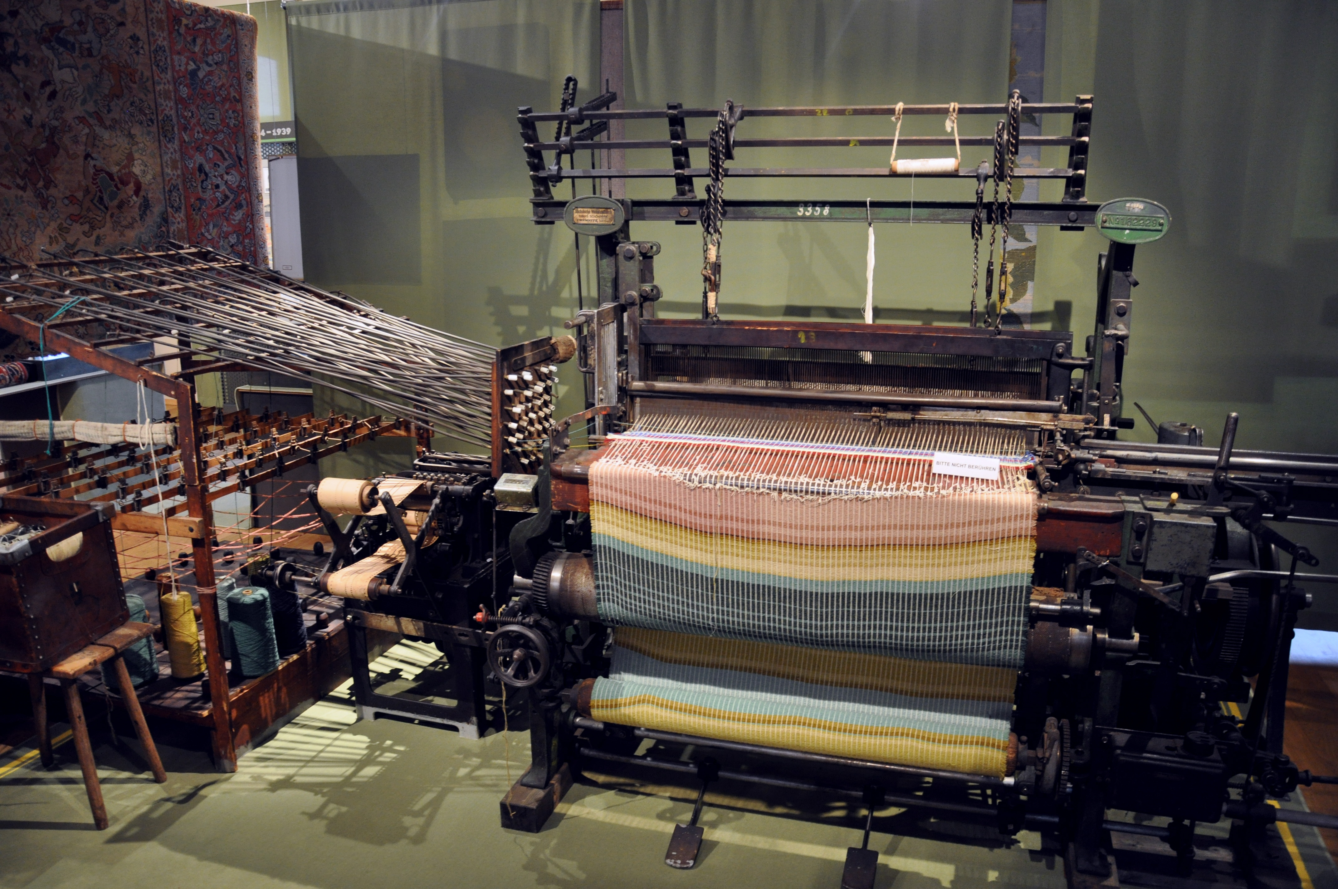 Oelsnitz/Vogtland, Teppich-Museum Schloss Voigtsberg Vielfarben-Webautomat zur Erzeugung der Vorware für Chenille-Axmisnter-Teppiche (automatischen Eintragung der farbigen Schüsse nach den Informationen der Patrone, die vorher auf Lochkarten übertragen wurden), Sächsische Webstuhlfabrik Louis Schönherr Chemnitz